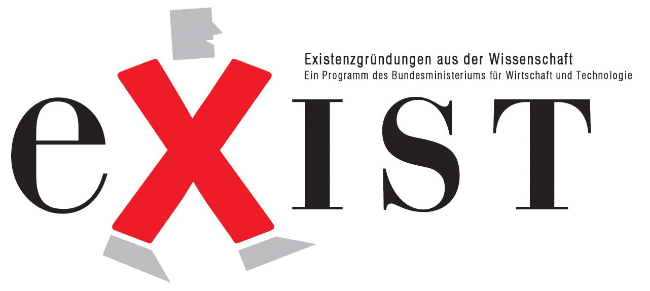 EXIST-Logo